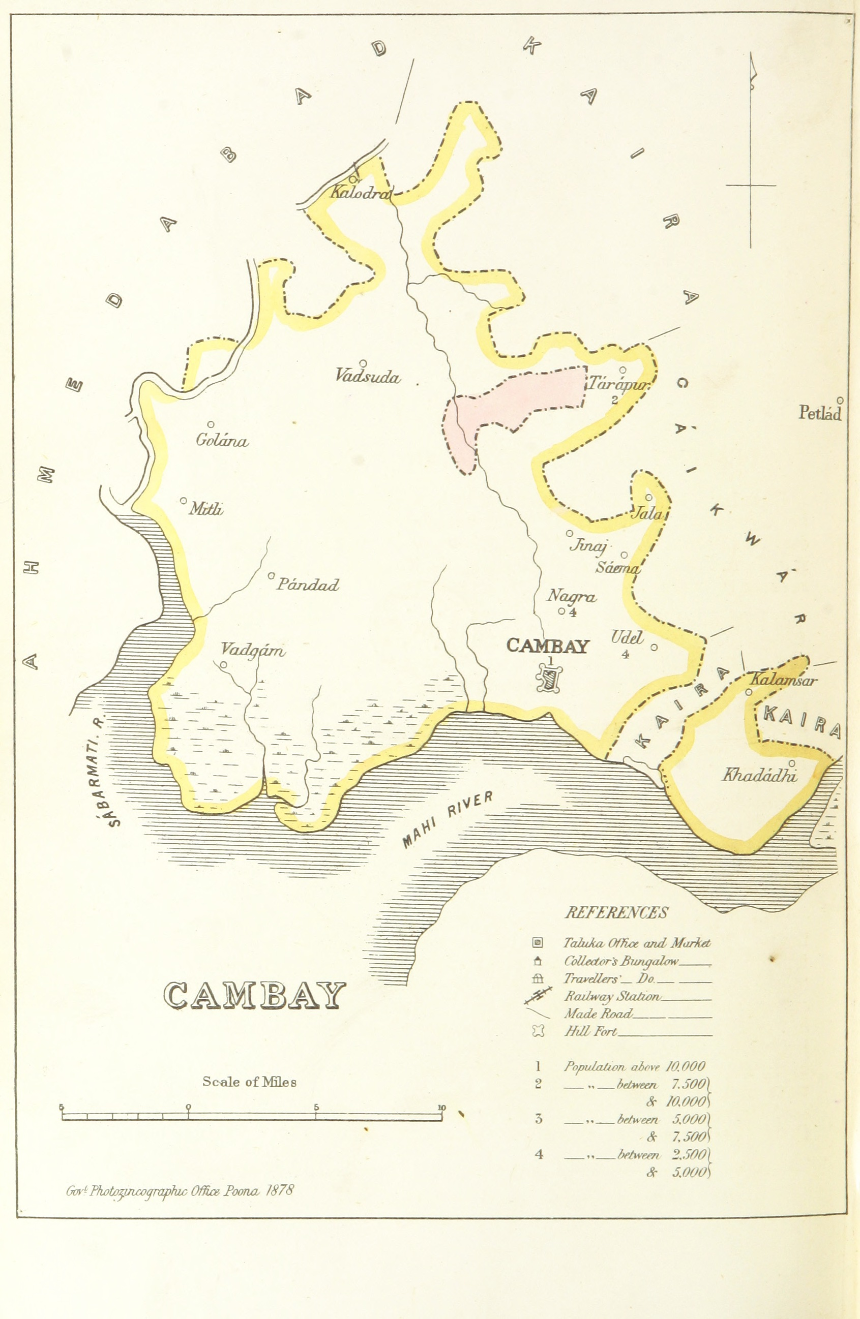 Cambay Gujarat 1896